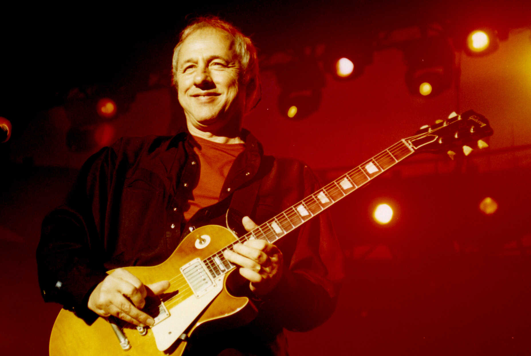 Mark Knopfler el 4 de julio de 2001 en la plaza de toros de Bilbao.